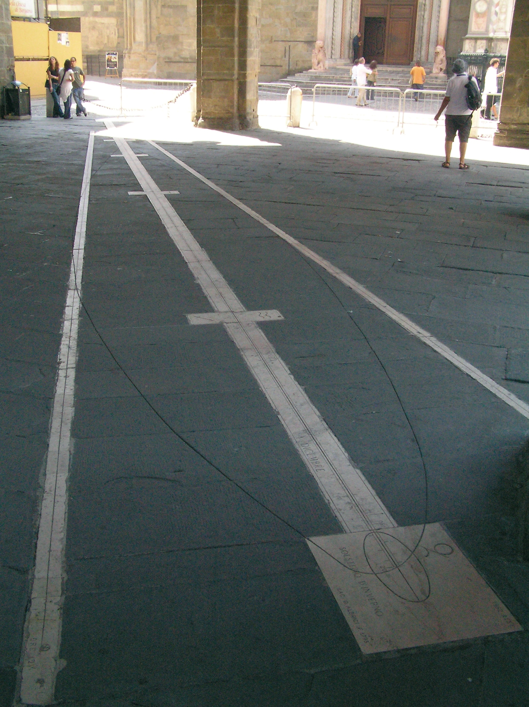 Bergamoko Piazza Vecchian badago loggia bat, Horren sabaian disko zulatu bat. Zulo hori eguzki izpi batek zekarkatzen du. Urtean zeharko kokapen guztiek eguzki egutegia marrazten dute lurrean.